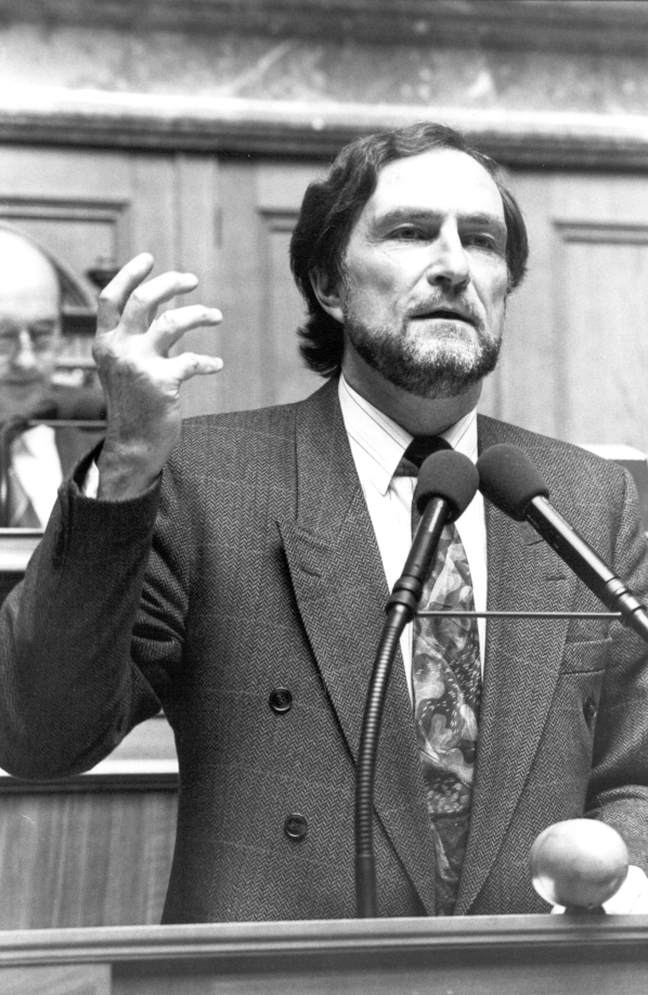 Roland Wiederkehr, Schweizer Politiker am Rednerpult im Nationalrat